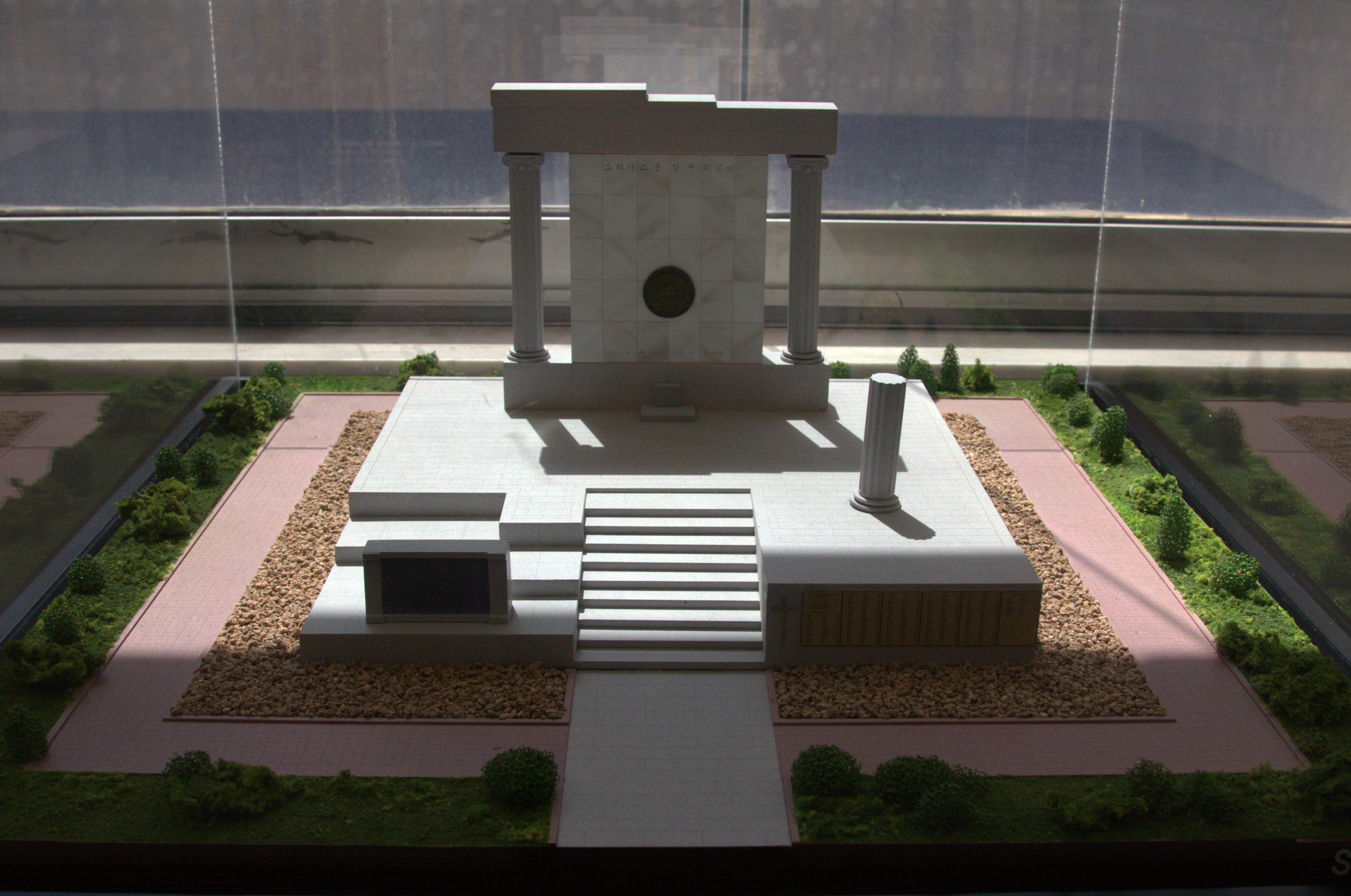 In honour of the Hellenic expeditionary force in Korea Hellenic War Museum (Athens, Greece). --- Προς τιμή του Ελληνικού εκστρατευτικού σώματος Κορέας. Πολεμικό Μουσείο Ελλάδος. Αθήνα.